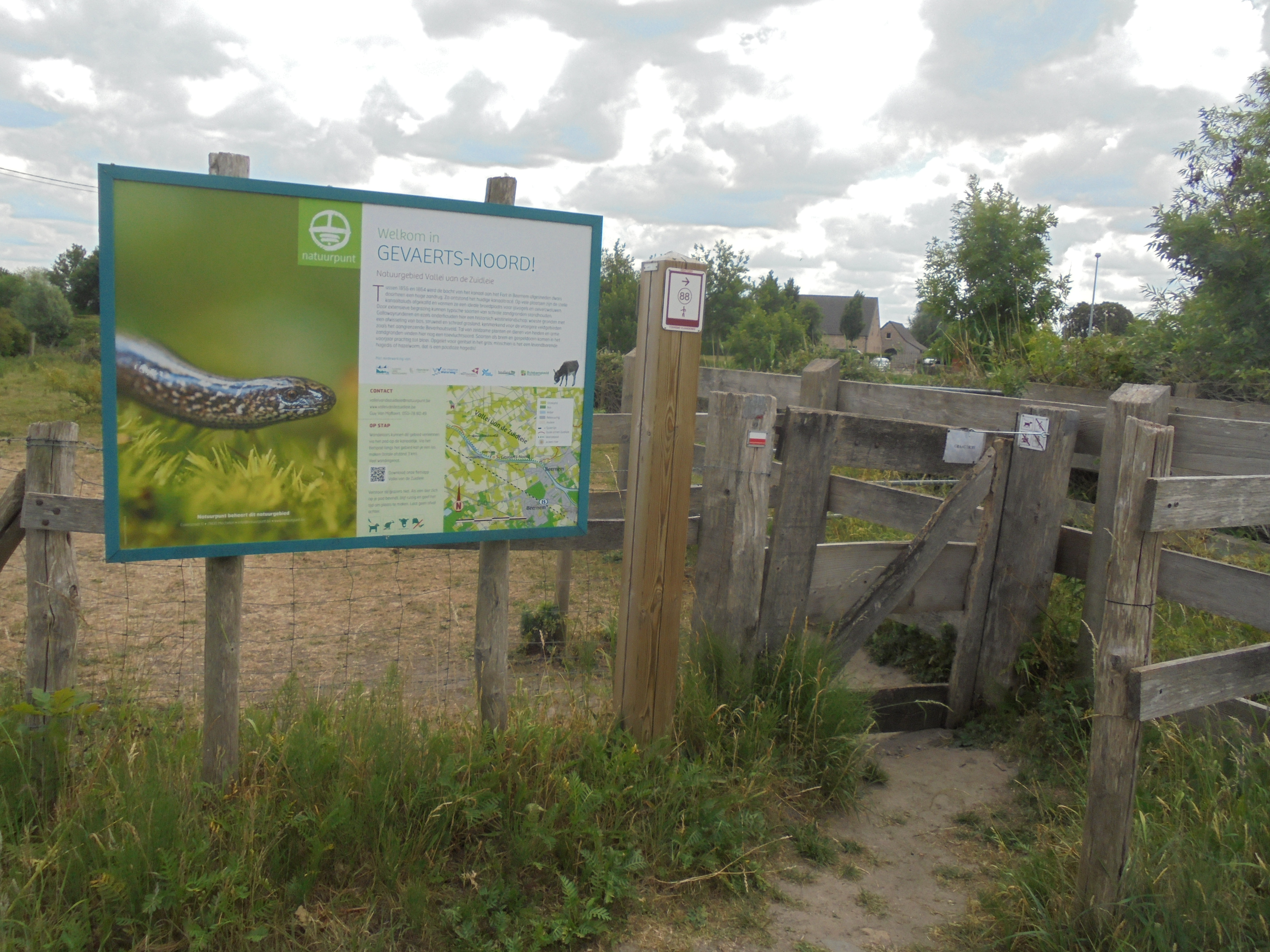 Ingang van het Natuurgebied Gevaerts-Noord - aan de noordzijde van de Kanaal Gent-Brugge-Oostende - Beernem - West-Vlaanderen - België.